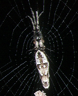 female Cyclosa ginnaga from Okinawa.